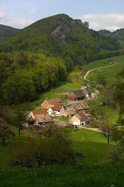 Der Weiler Schöntal mit dem Kloster bei Langenbruck